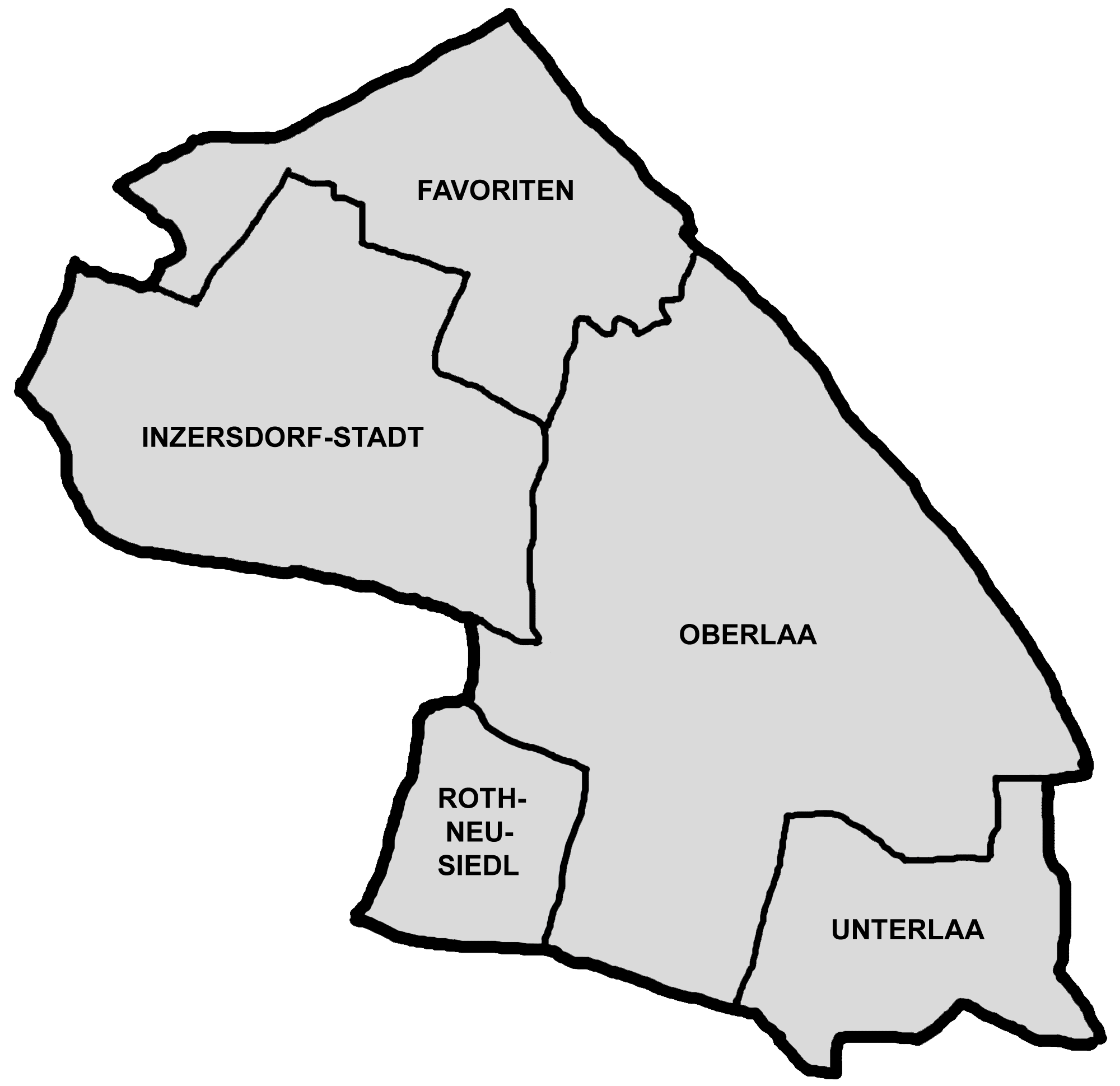 Karte der Bezirksteile von Favoriten in Wien